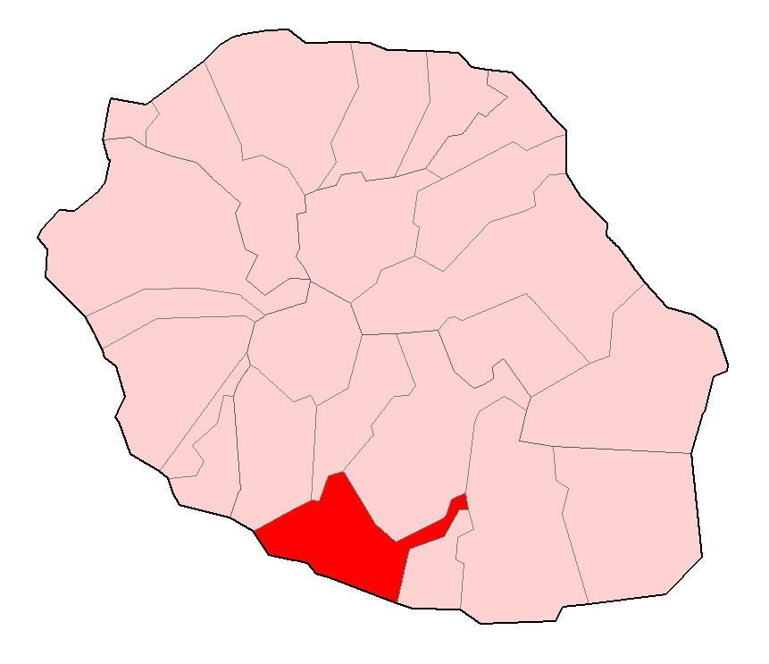 Carte de la Réunion permettant de localiser Saint-Pierre.